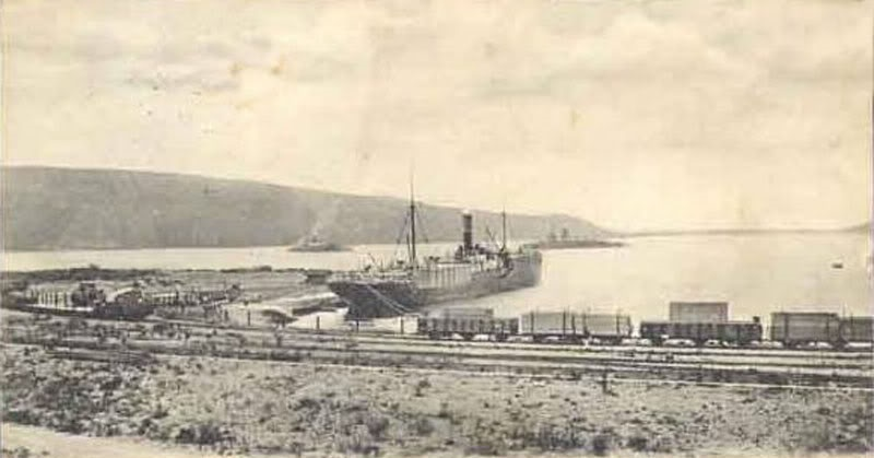 Zelenika Landungsplatz